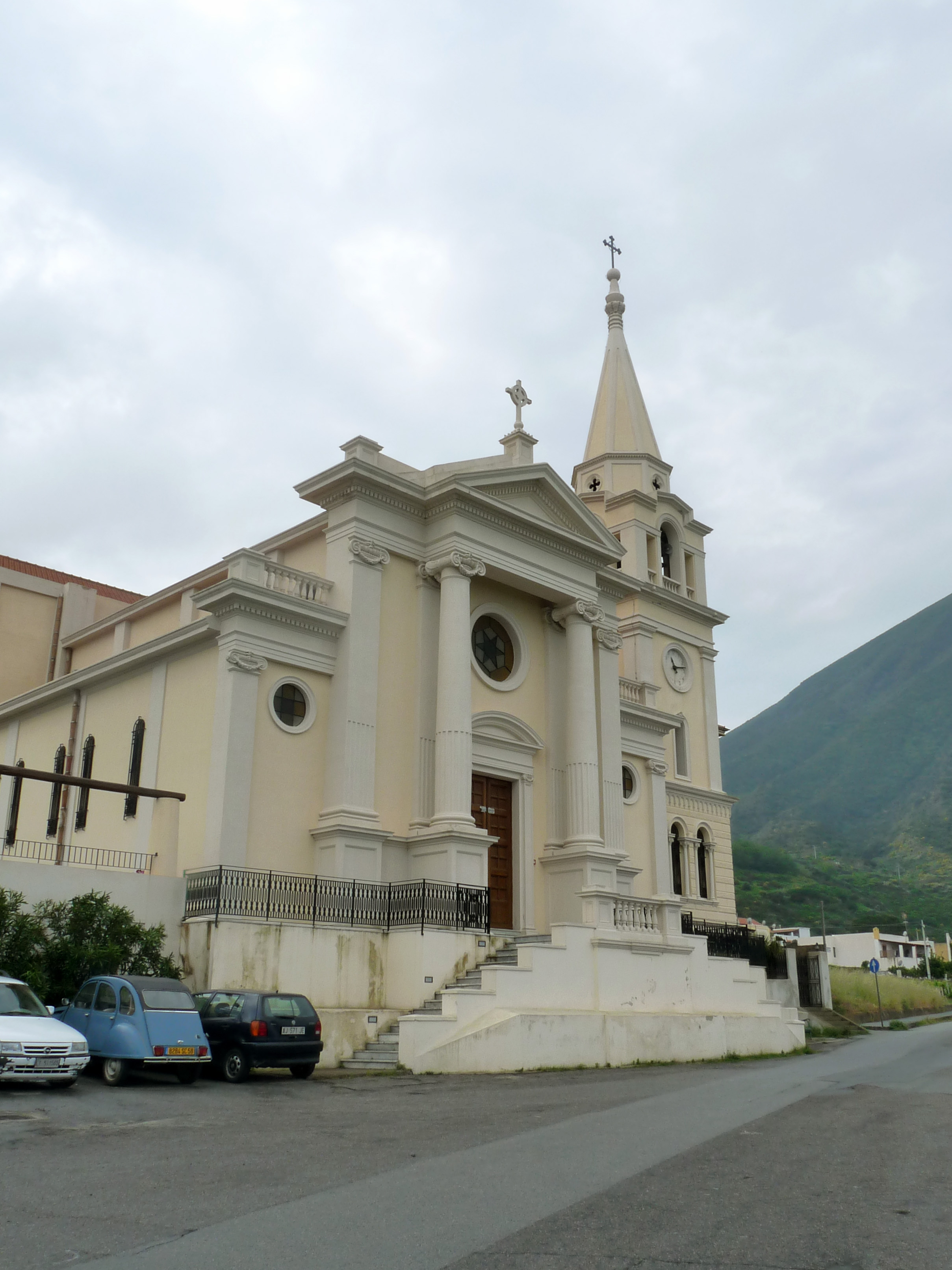 Chiesa di San Lorenzo, l'une des églises de Malfa sur l'île de Salina (îles Eoliennes, Sicile)